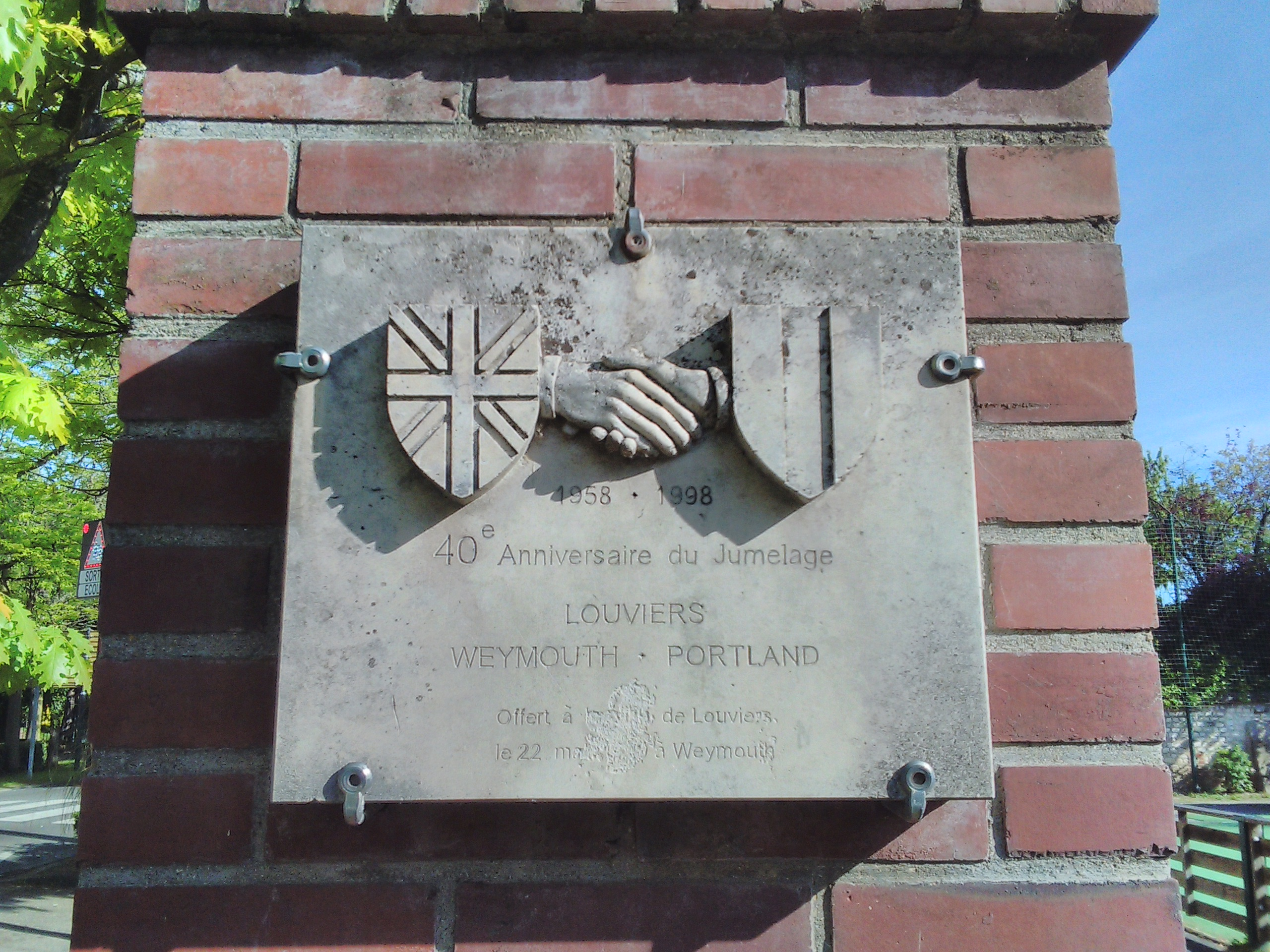 Louviers - Tour de ville du 16 mai 2019 - 2